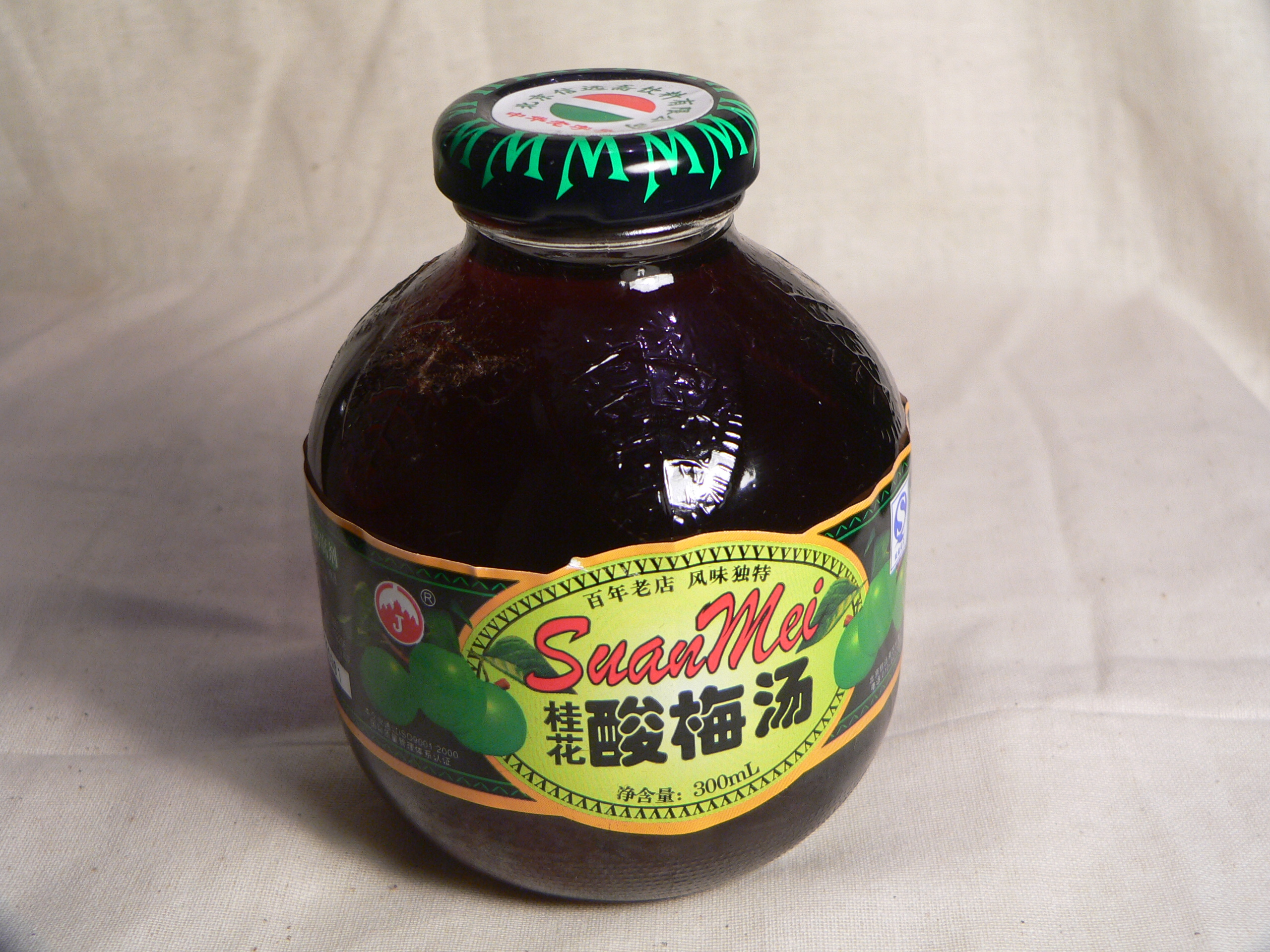 信远斋酸梅汤/Xinyuanzhai brand sour plum drink